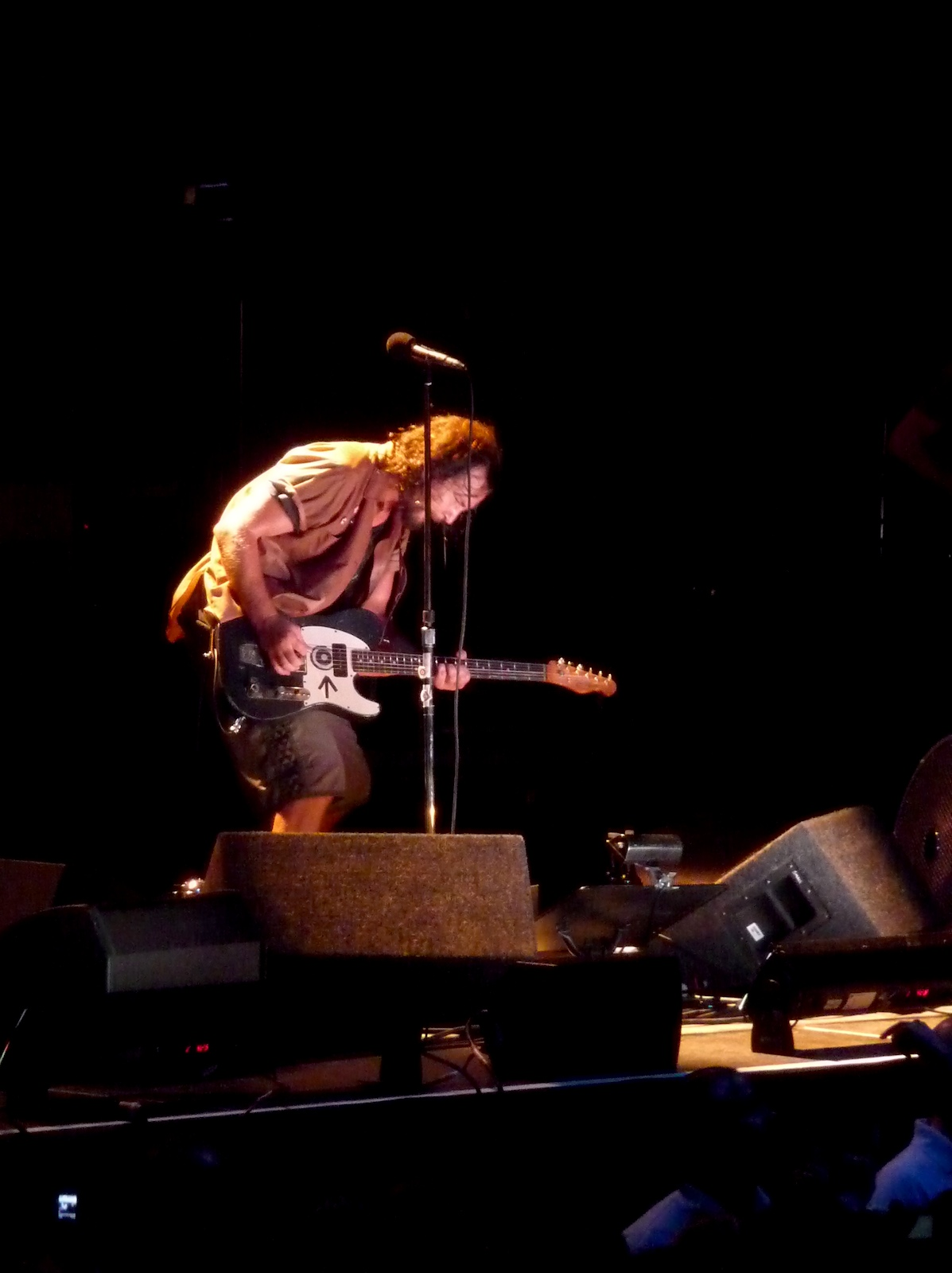 August 2009